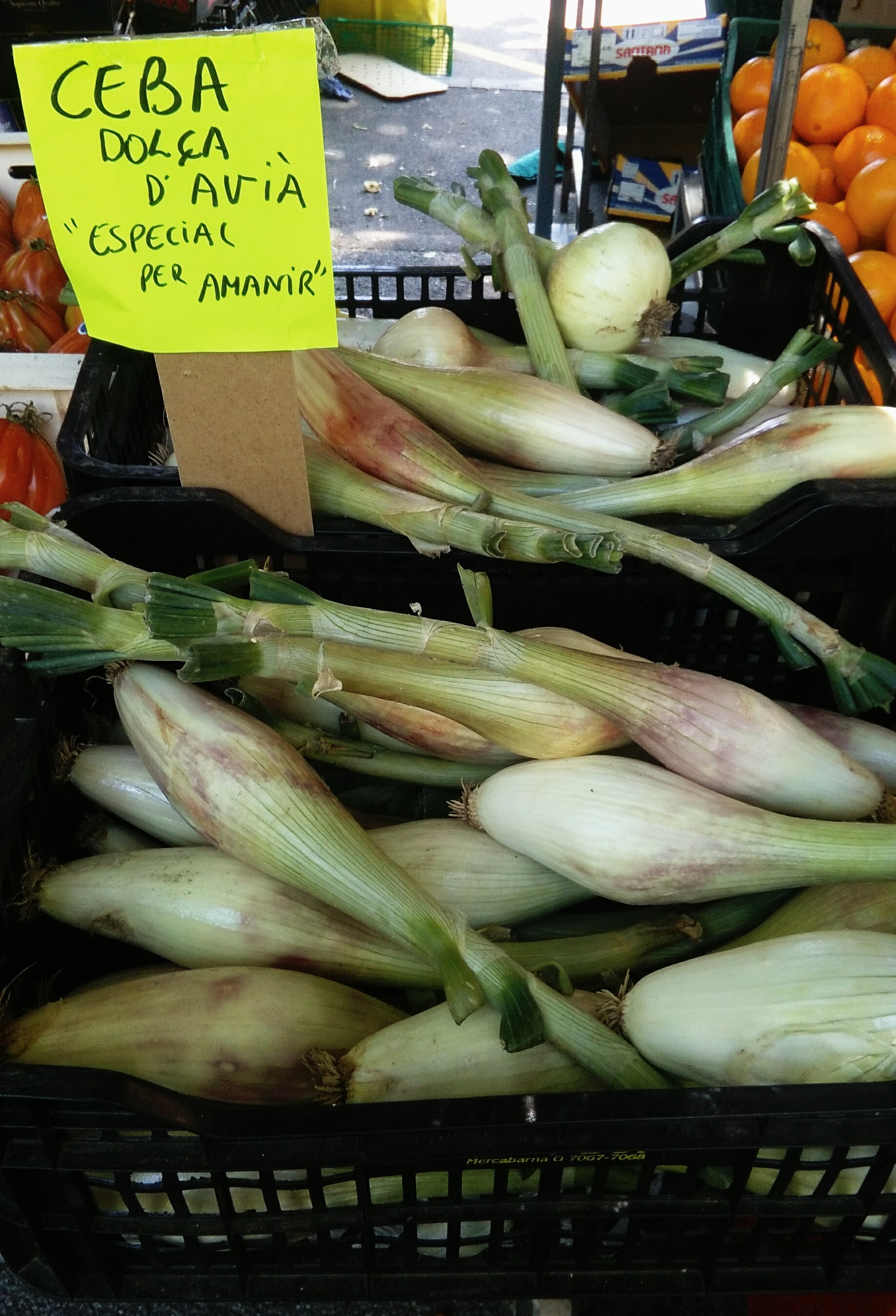 Ceba llarga del Berguedà al mercat setmanal de Berga.